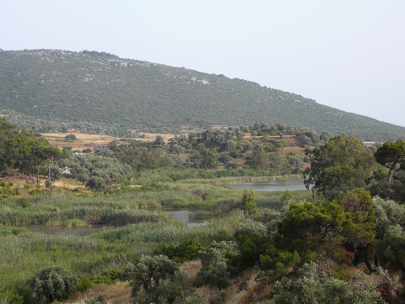 Der versandete Hafen des antiken Patara ca. 2 km im Inland am Ortsrand des Dorfes Patara